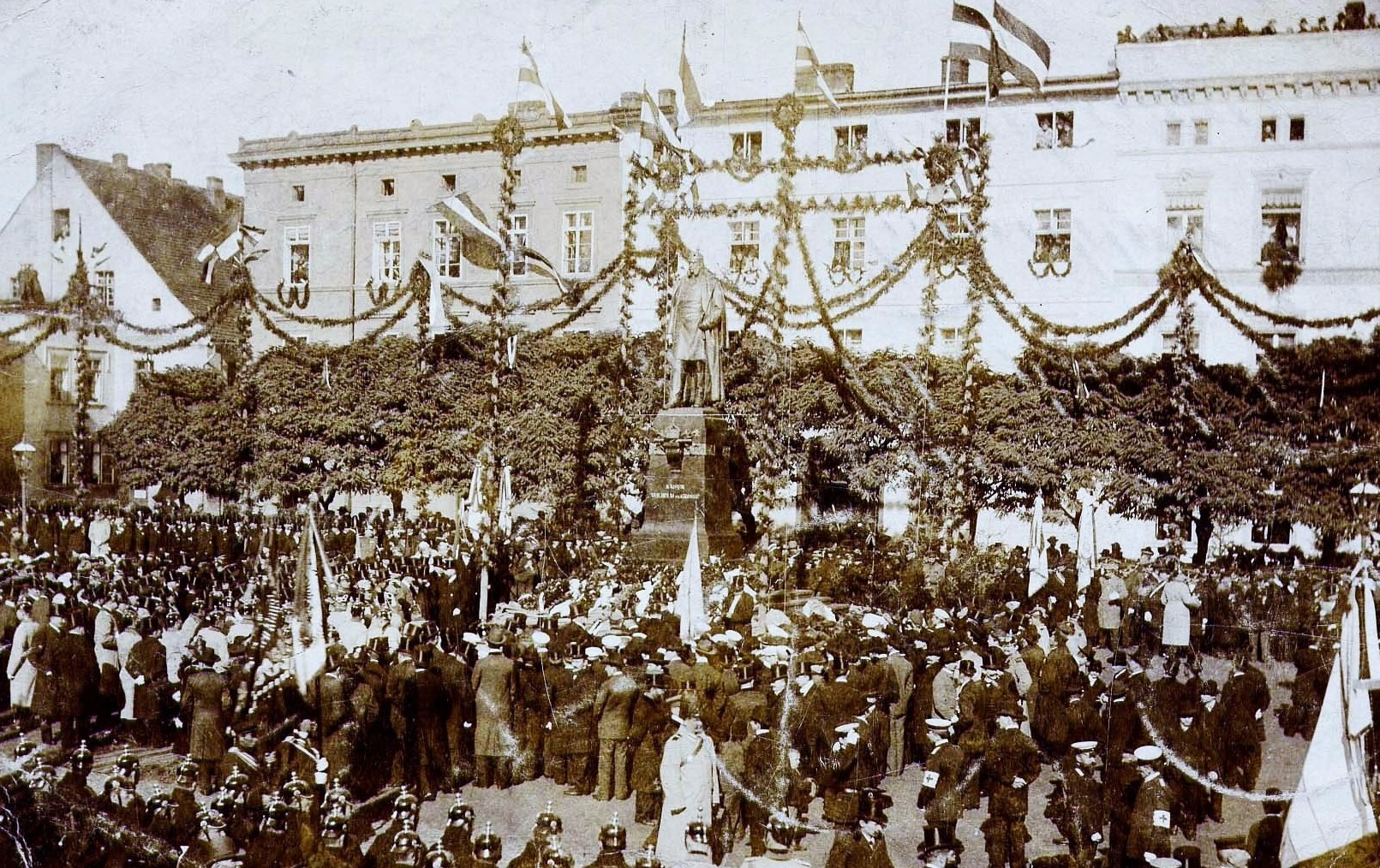 14 października 1905 r. nastąpiło uroczyste odsłonięcie pomnika cesarza Wilhelma I.